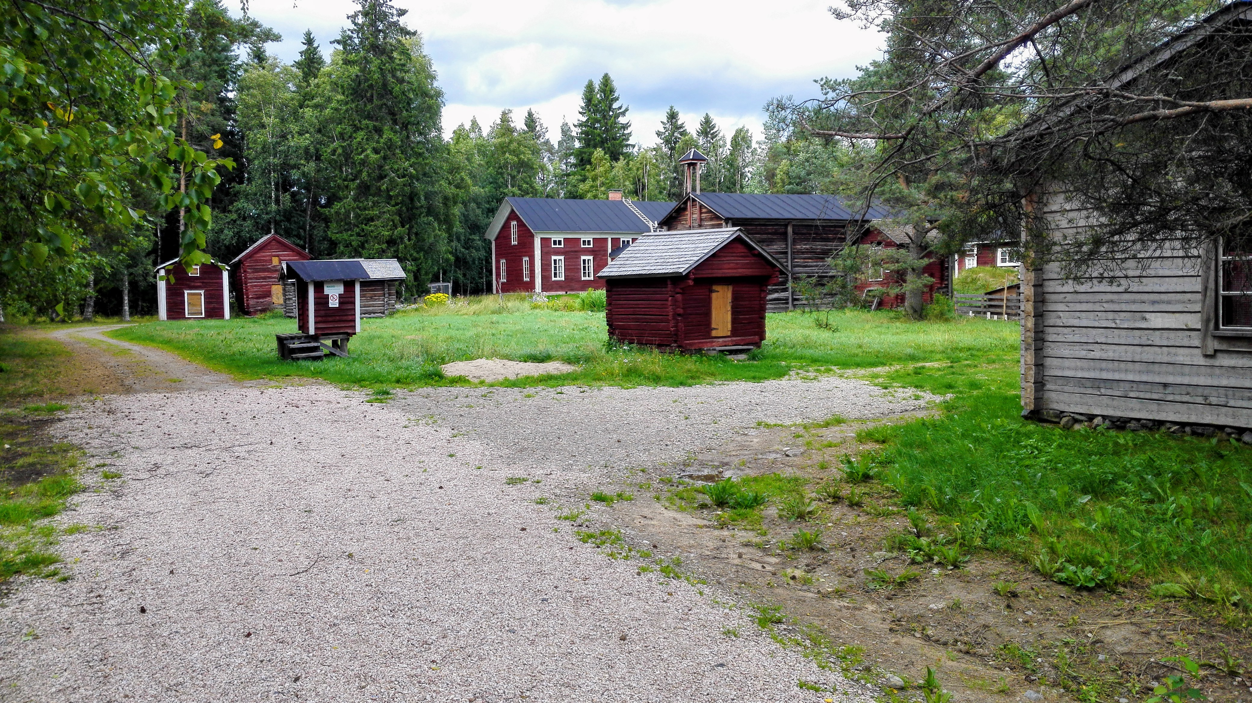 Katvalan talonpoikaismuseoalue portilta kuvattuna elokuussa 2017.